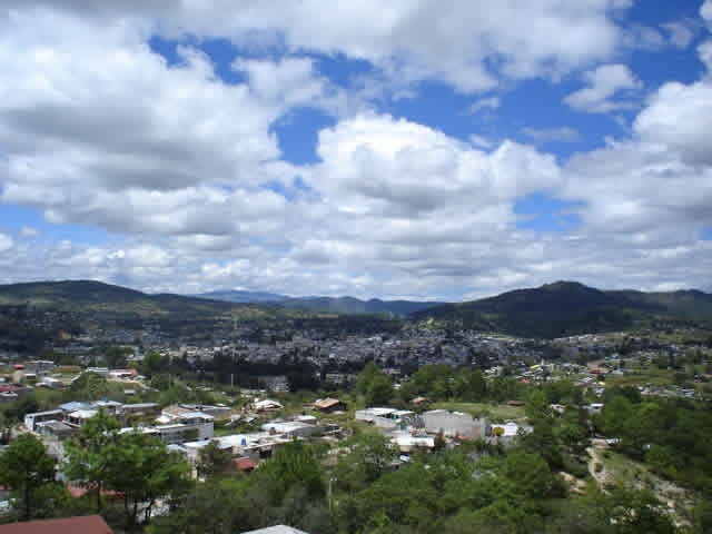 Foto panoramica de tlaxiaco